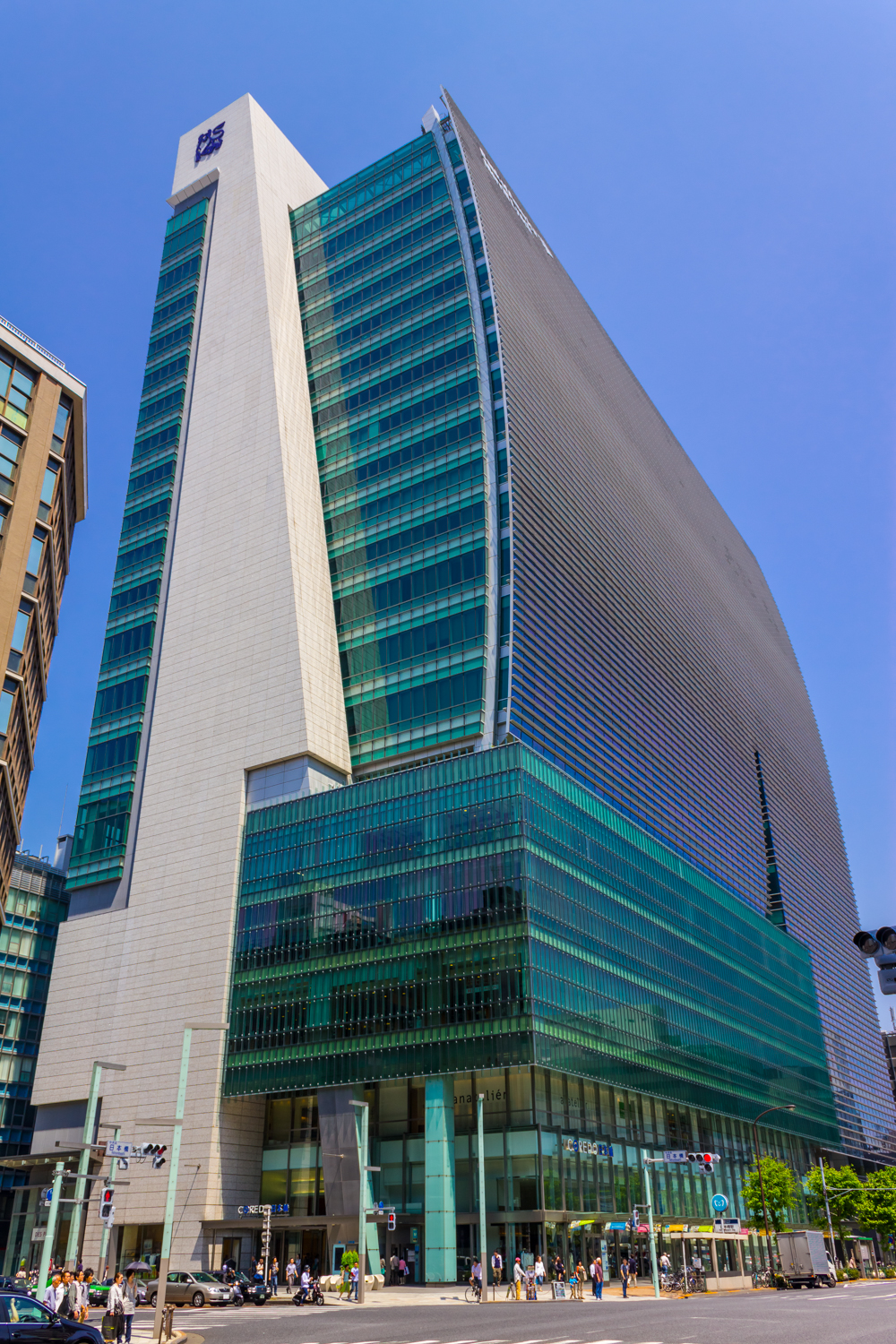 日本橋一丁目ビルディング（コレド日本橋）